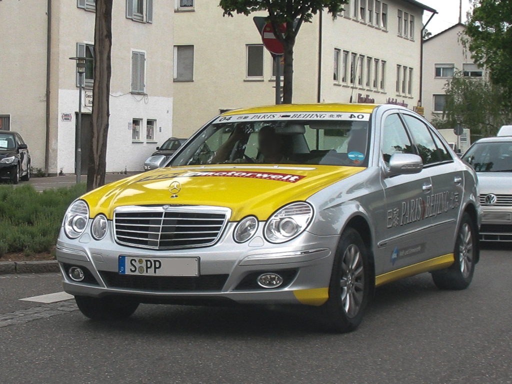 Mercedes-Benz E-Klasse Paris-Peking (Baureihe 211)